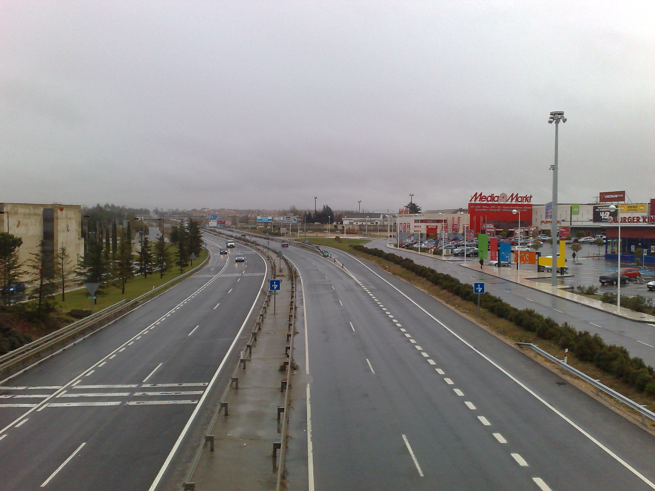 Capuchinos